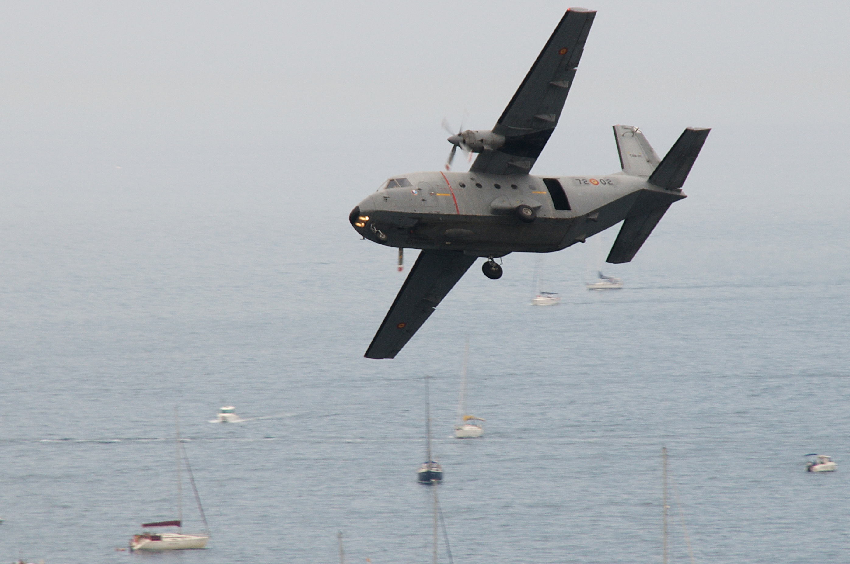 Festival Aereo Cadiz 2009